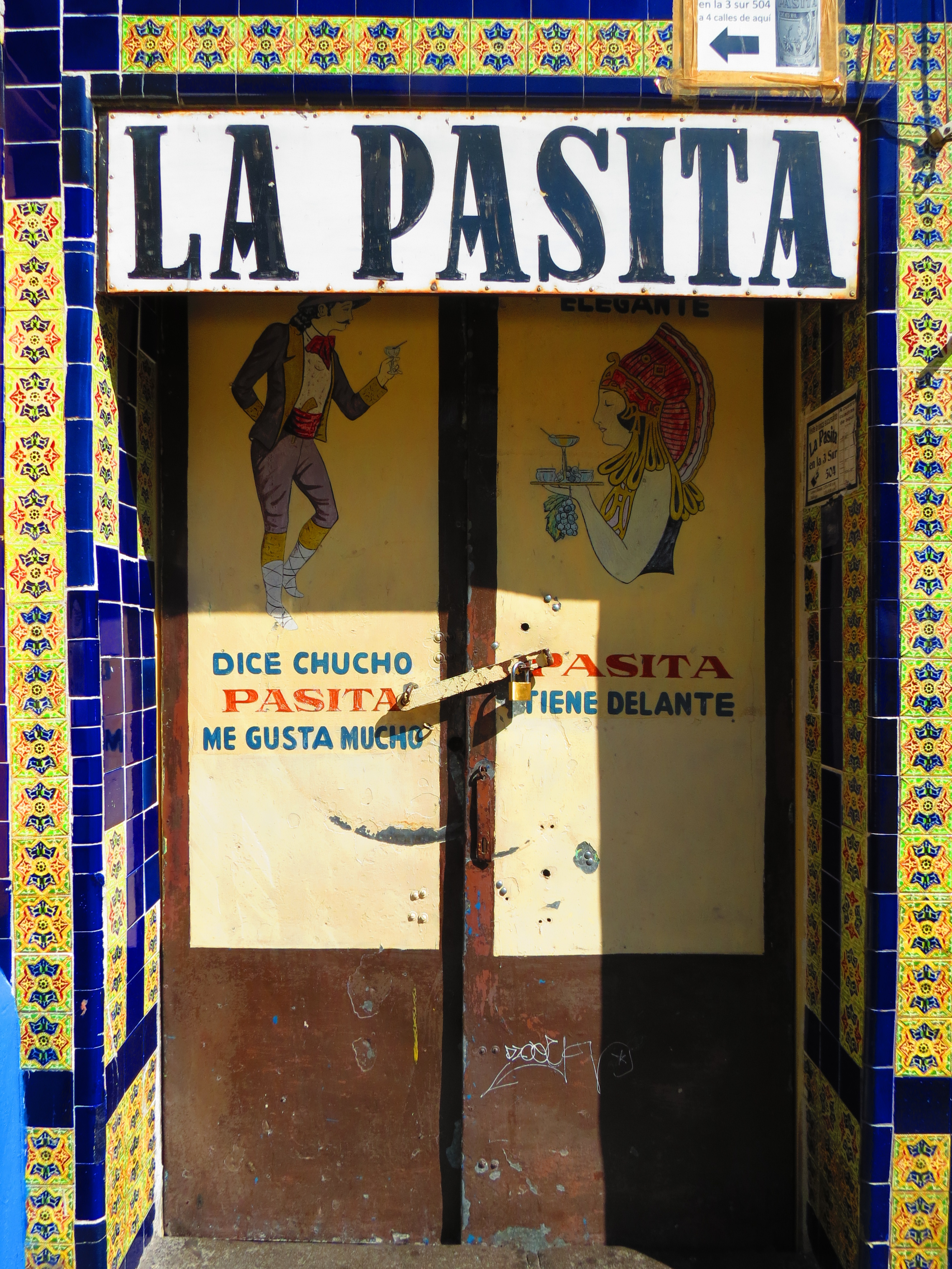 La Pasita, licorería tradicional de Puebla, ubicada frente al callejón de Los Sapos.